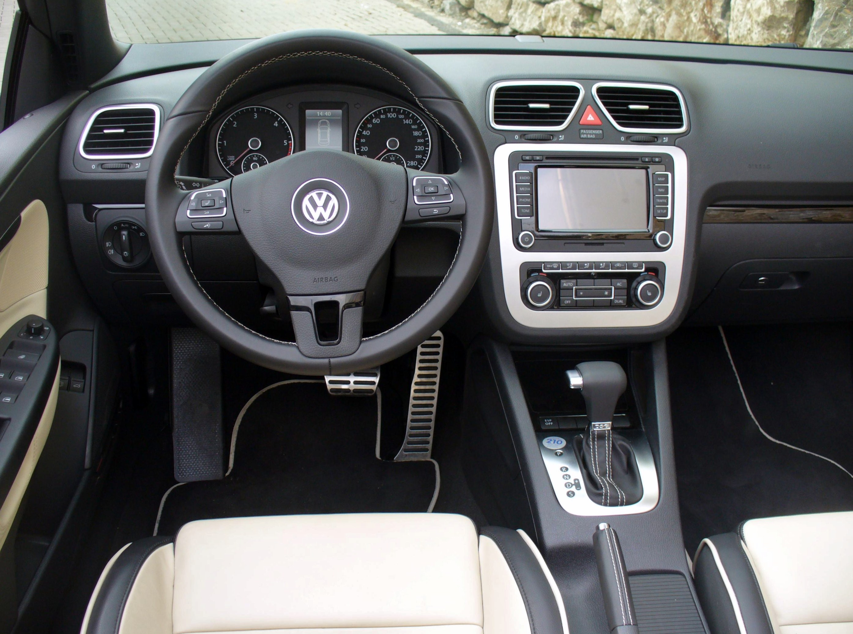 VW Eos Individual